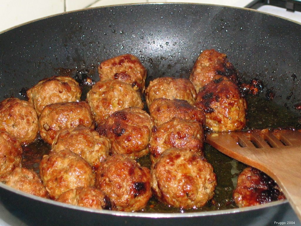 Foto door Fruggo, september 2004, licentie CC-BY. Dutch meatballs